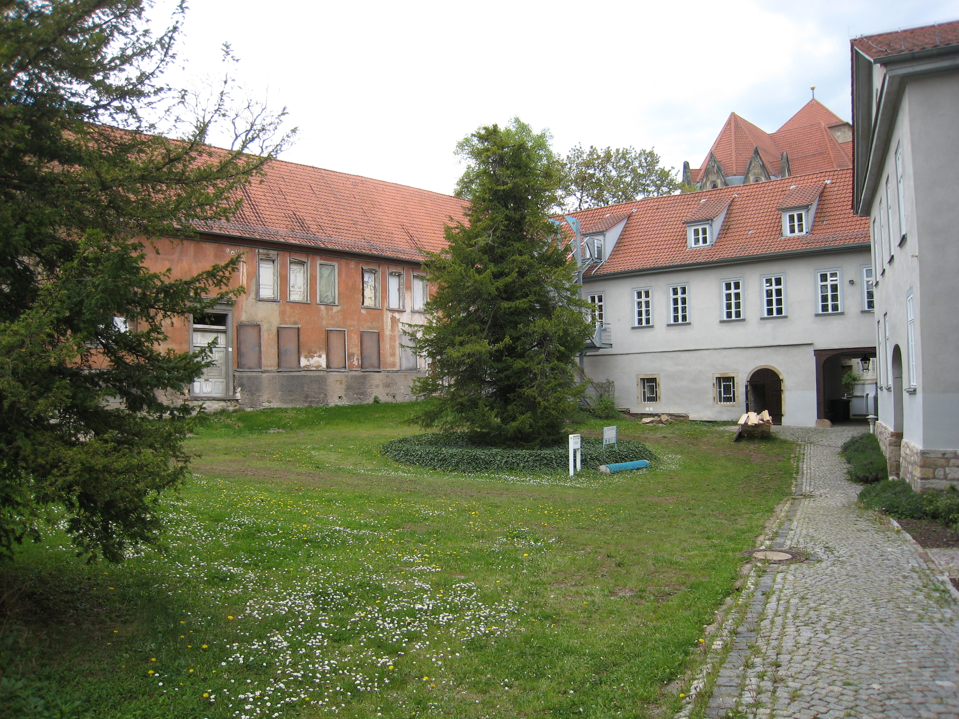 Teil des Innenhofs des Prinzenhofs in Arnstadt, geradeaus und rechts Bibliotheksgebäude.